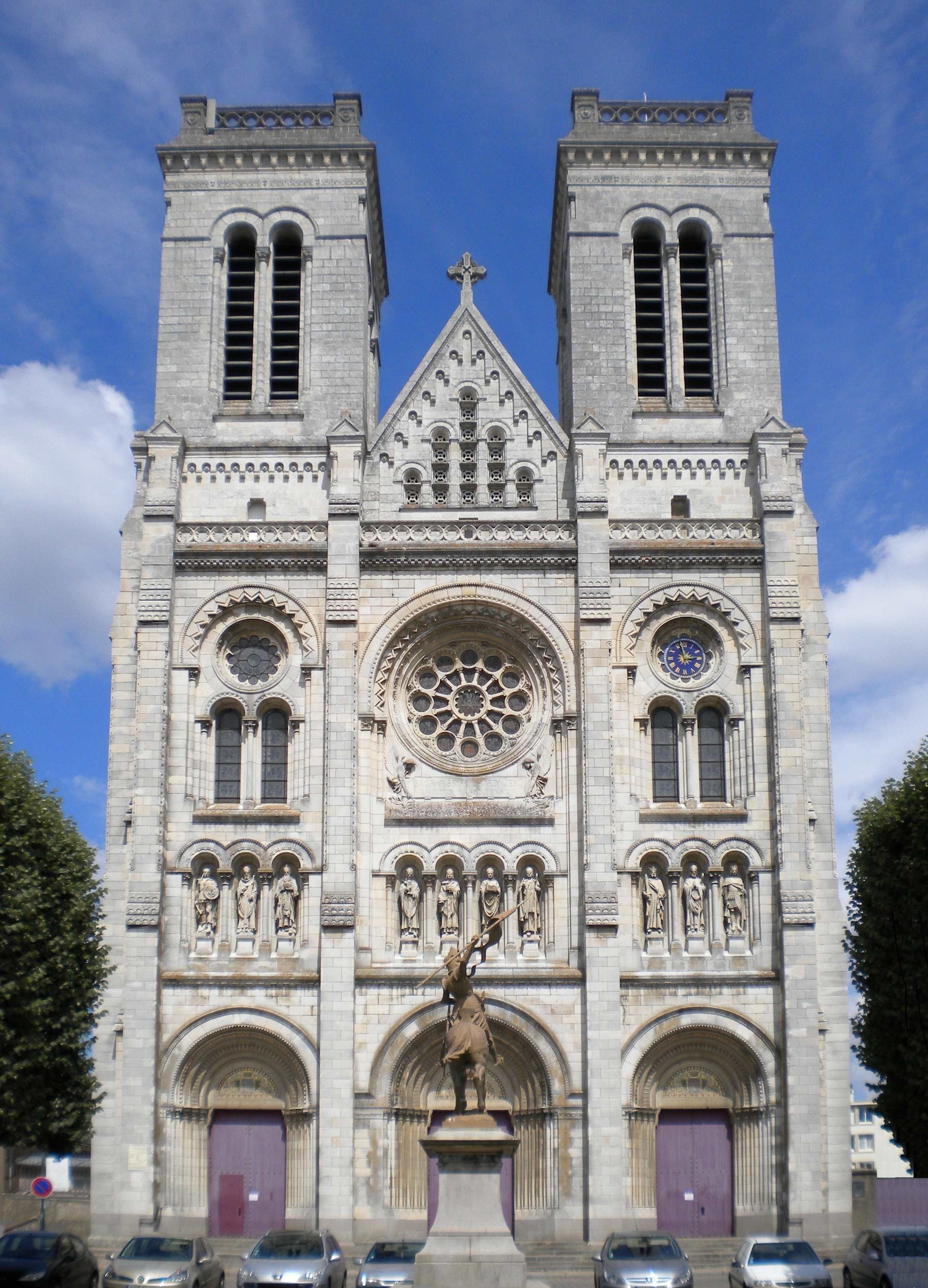 Basilica Sanctorum Fratrum Martyrum Donatiani et Rogatiani Namnetensium